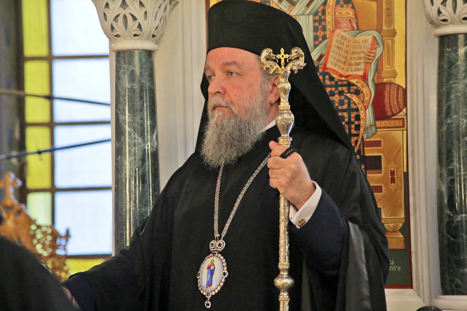 Μητροπολίτης Διαυλείας Αλέξιος